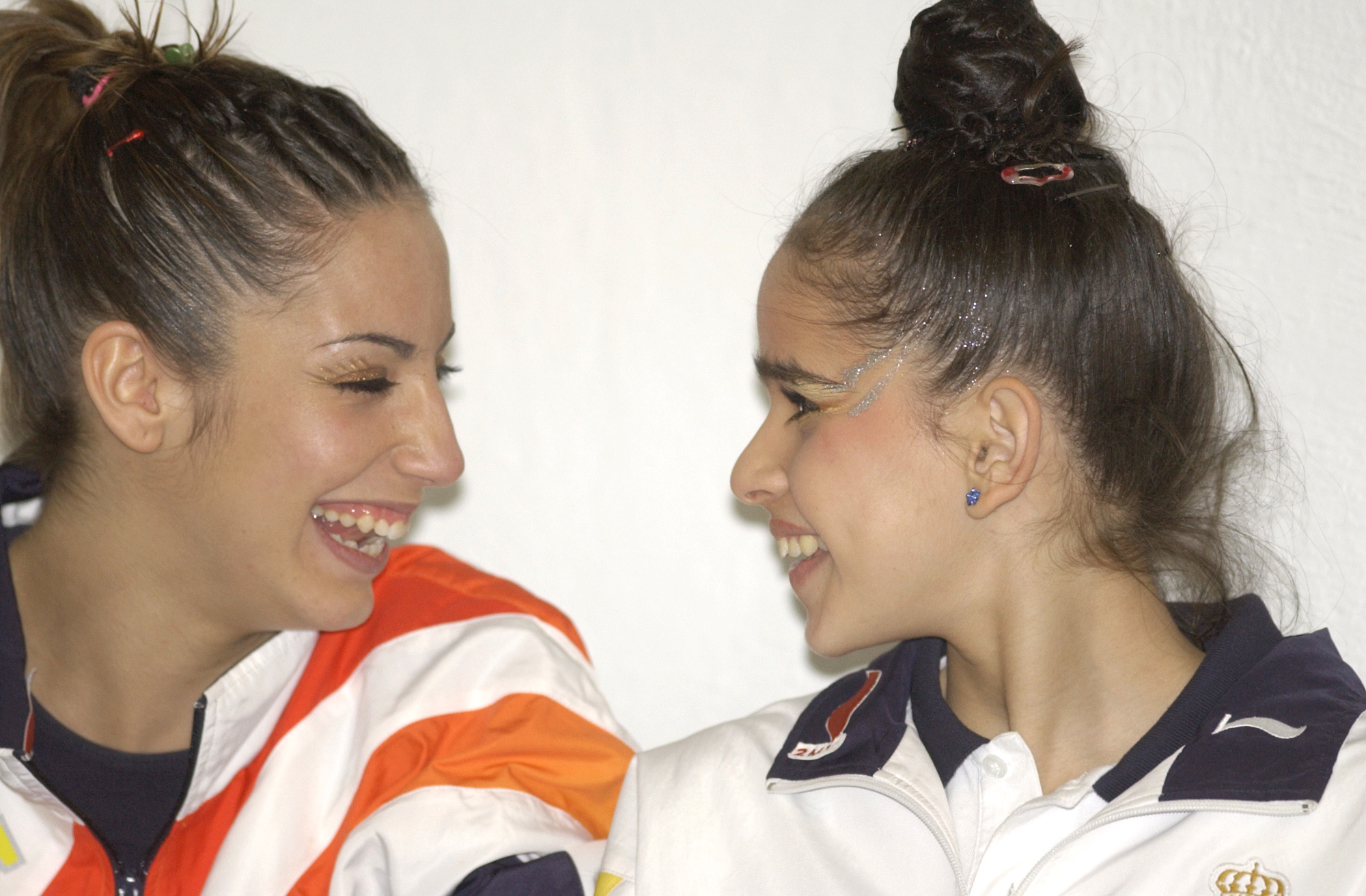 Almudena Cid y Jennifer Colino en el Campeonato Europeo de Gimnasia Rírmica de Granada en 2002.